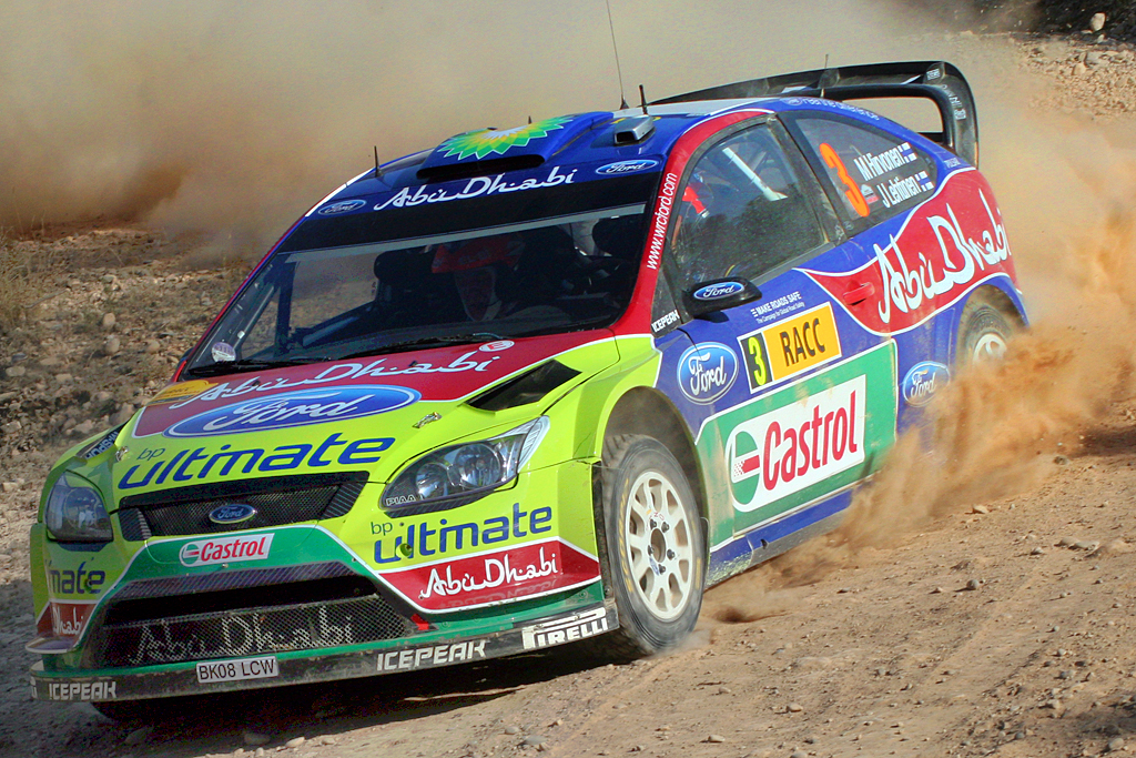 Hirvonen-Lehtinen Catalunya2010